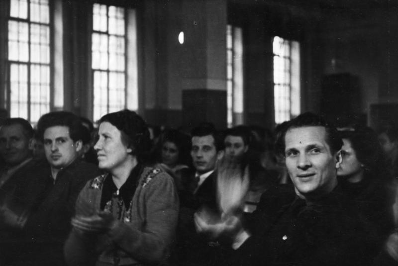 Berlin-Weissensee, Edith Baumann, Erich Honecker Illus: Kongreß der Jungaktivisten der Treuhandbetriebe am 13.11.48 i. Berlin Weißensee. UBz: Blick in den Sitzungssaal, v.r. Erich Honecker ADN-ZB: Berlin: Kongreß der Jungaktivisten der Treuhandbetriebe in Weißensee. Zu den Teilnehmern gehörten Erich Honecker, Vorsitzender des Zentralrates der FDJ und Edith Baumann, stellvertretende Vorsitzende des Zentralrates der FDJ. Abgebildete Personen: Baumann, Edith: Mitglied des ZK der SED, Volkskammerabgeordnete, DDR Honecker, Erich: Staatsratsvorsitzender, Generalsekretär des ZK der SED, DDR (PND 118553399)